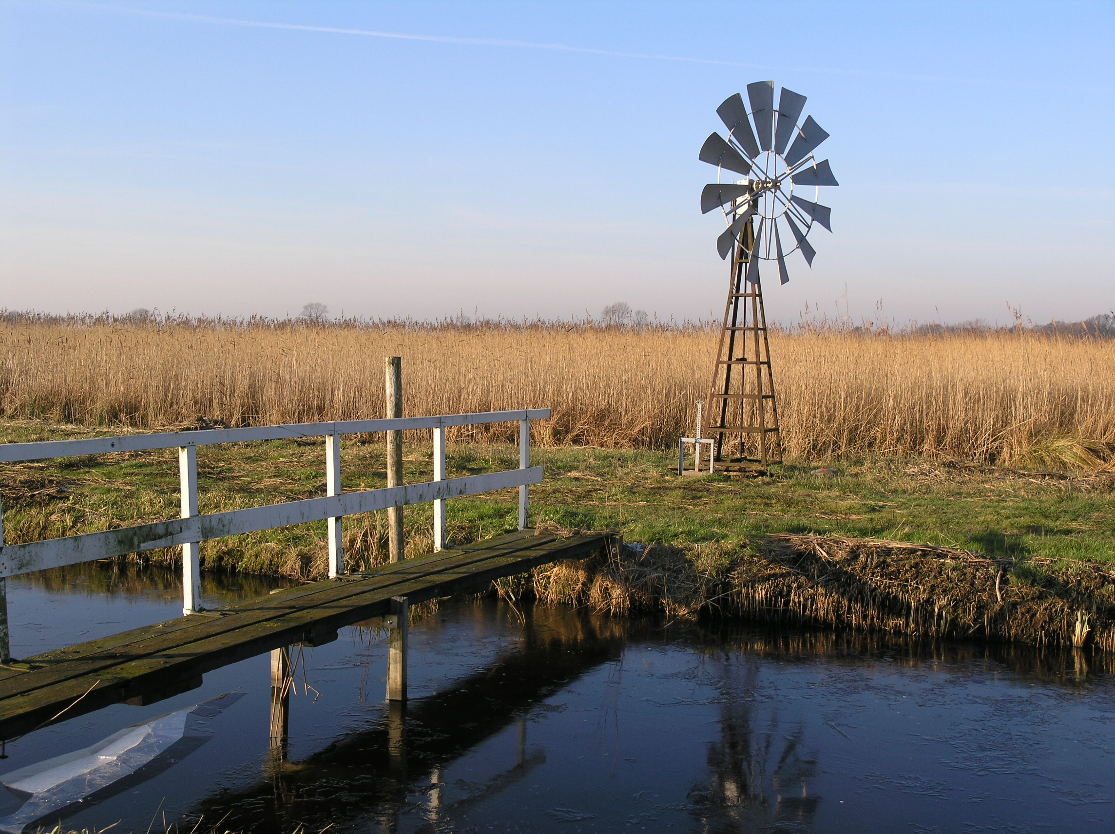 Oldelamer Windmotor